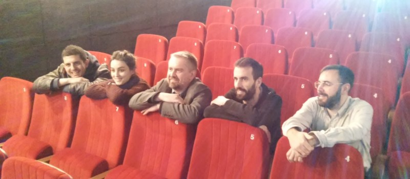 O equipo de NUMAX, na sala de cinema de Santiago de Compostela.